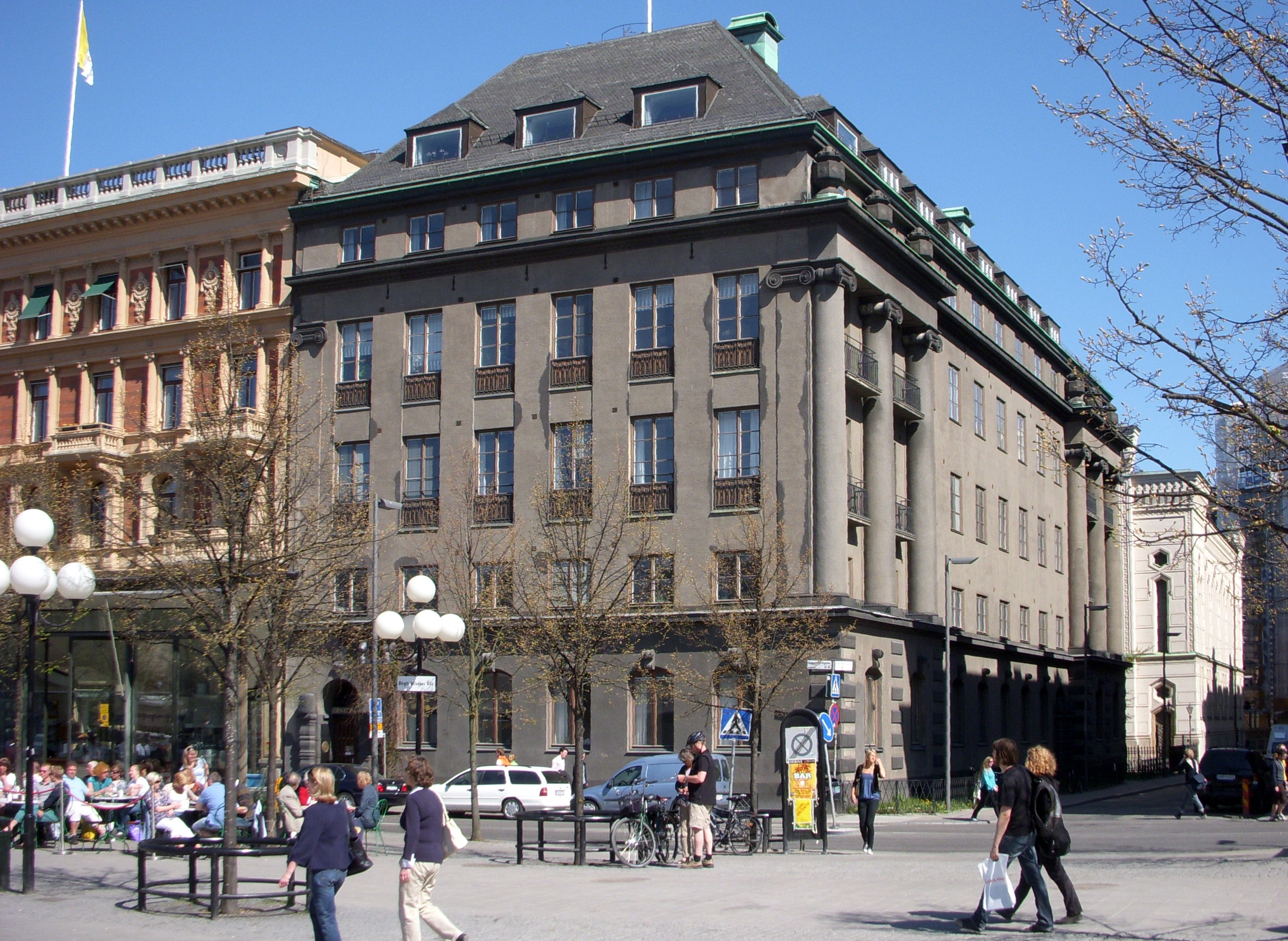 Jernkontorets nya hus på Kungsträdgårdsgatan 10, Norrmalm i Stockholm. Byggår 1913-1914. Arkitekt Ivar Tengbom.